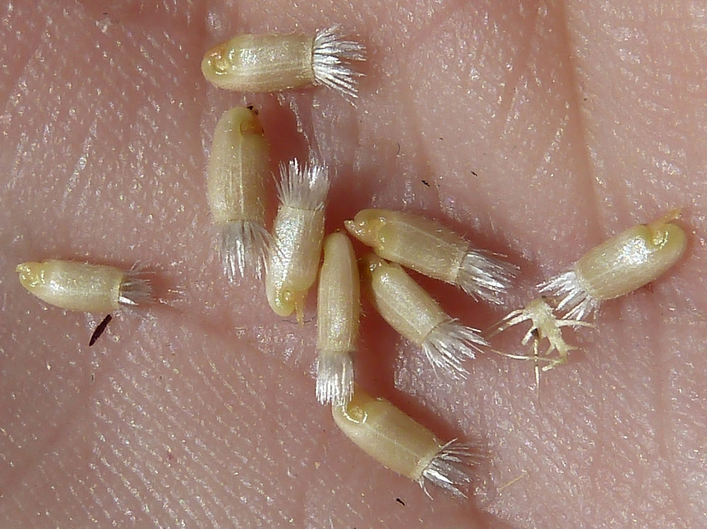 Centaurea pullata (Cabeza de pollo): Cipselas sueltas con eleosoma y doble vilano persietente, el externo con varias filas de escamas escabridas - La Huerta, Albatera (Alicante, España).